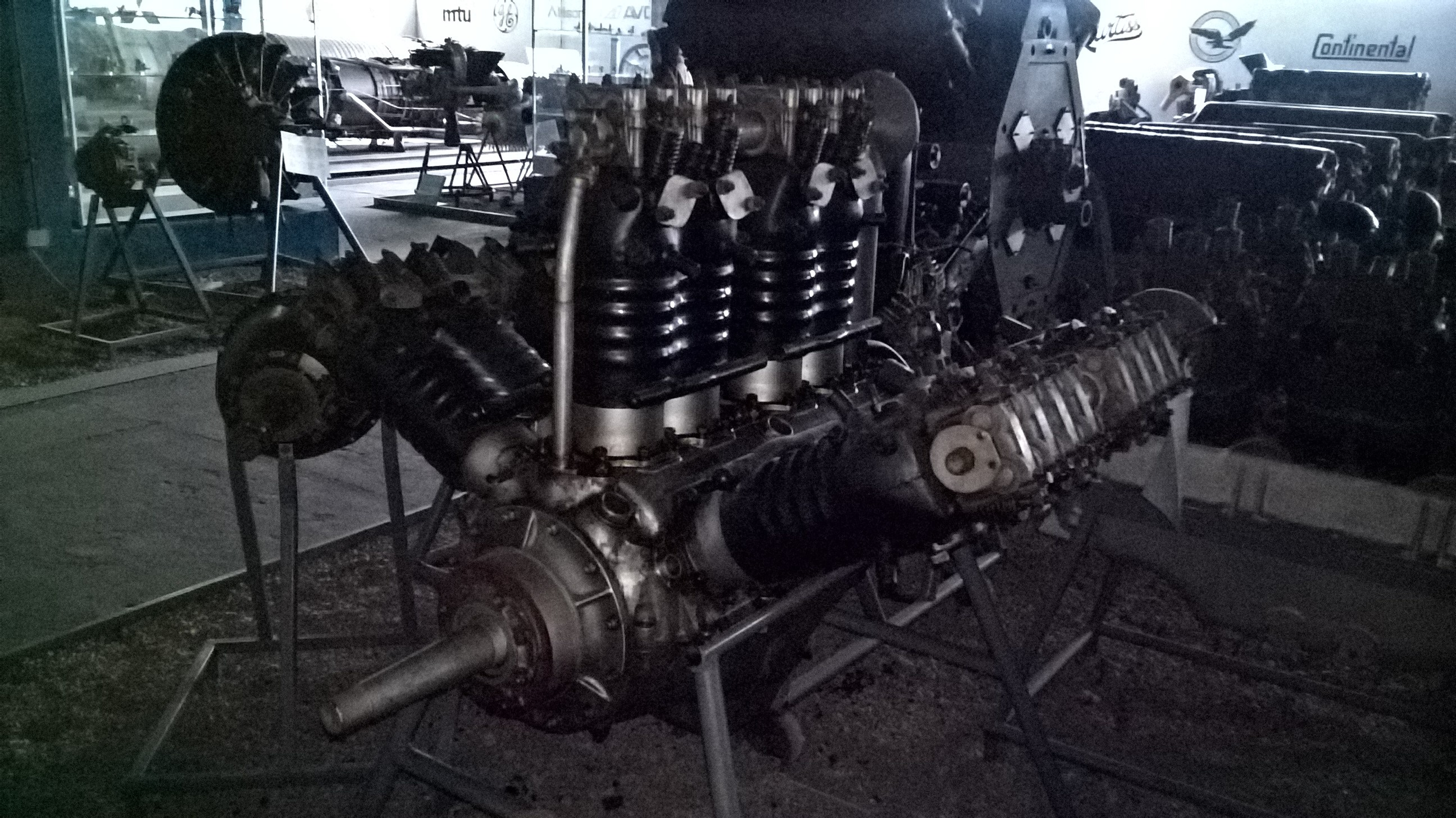 Francuski 12-cylindrowy silnik rzędowy Lorraine Dietrich 12 Eb z okresu po 1924 r., ze zbiorów Muzeum Lotnictwa Polskiego w Krakowie.